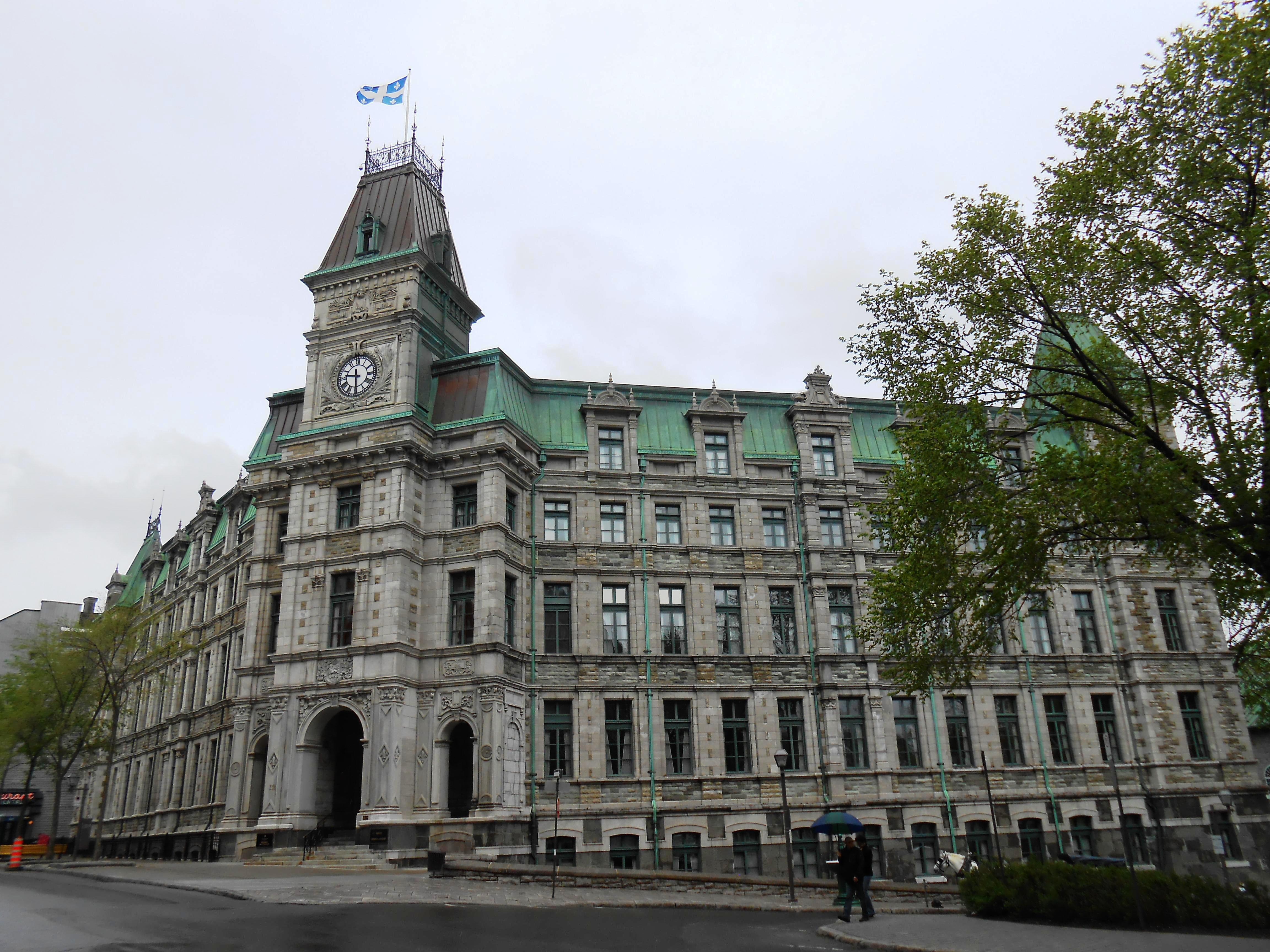 L'édifice Gérard-D.-Levesque, au 12, rue Saint-Louis, Québec, est un ancien palais de justice construit en 1887. Il a été désigné lieu historique national en 1980 et classé immeuble patrimonial en 1984. Il abrite aujourd'hui le ministère des Finances